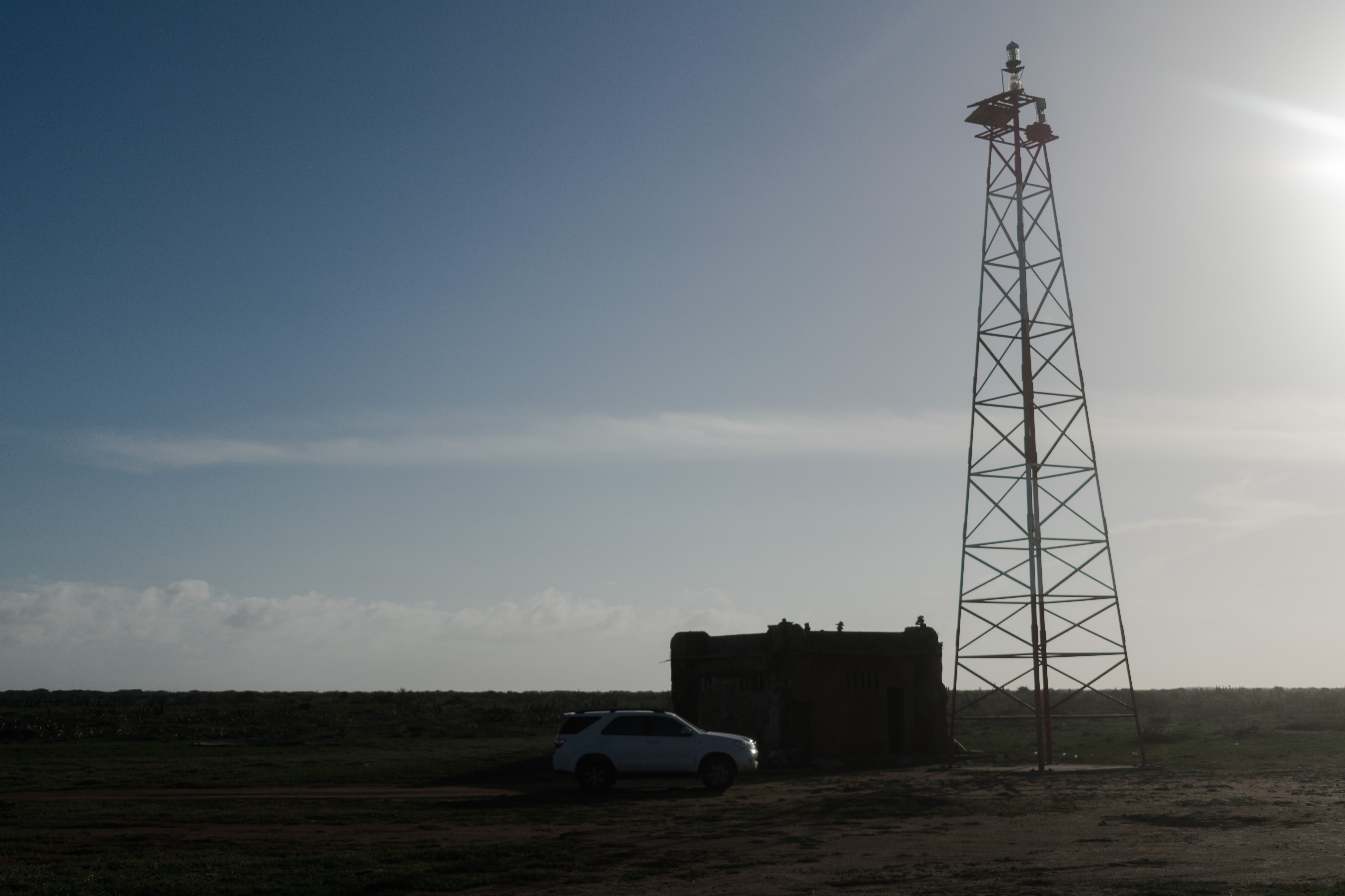 Esta fotografía fue tomada en un área protegida de Colombia con el código N/A del RUNAP.